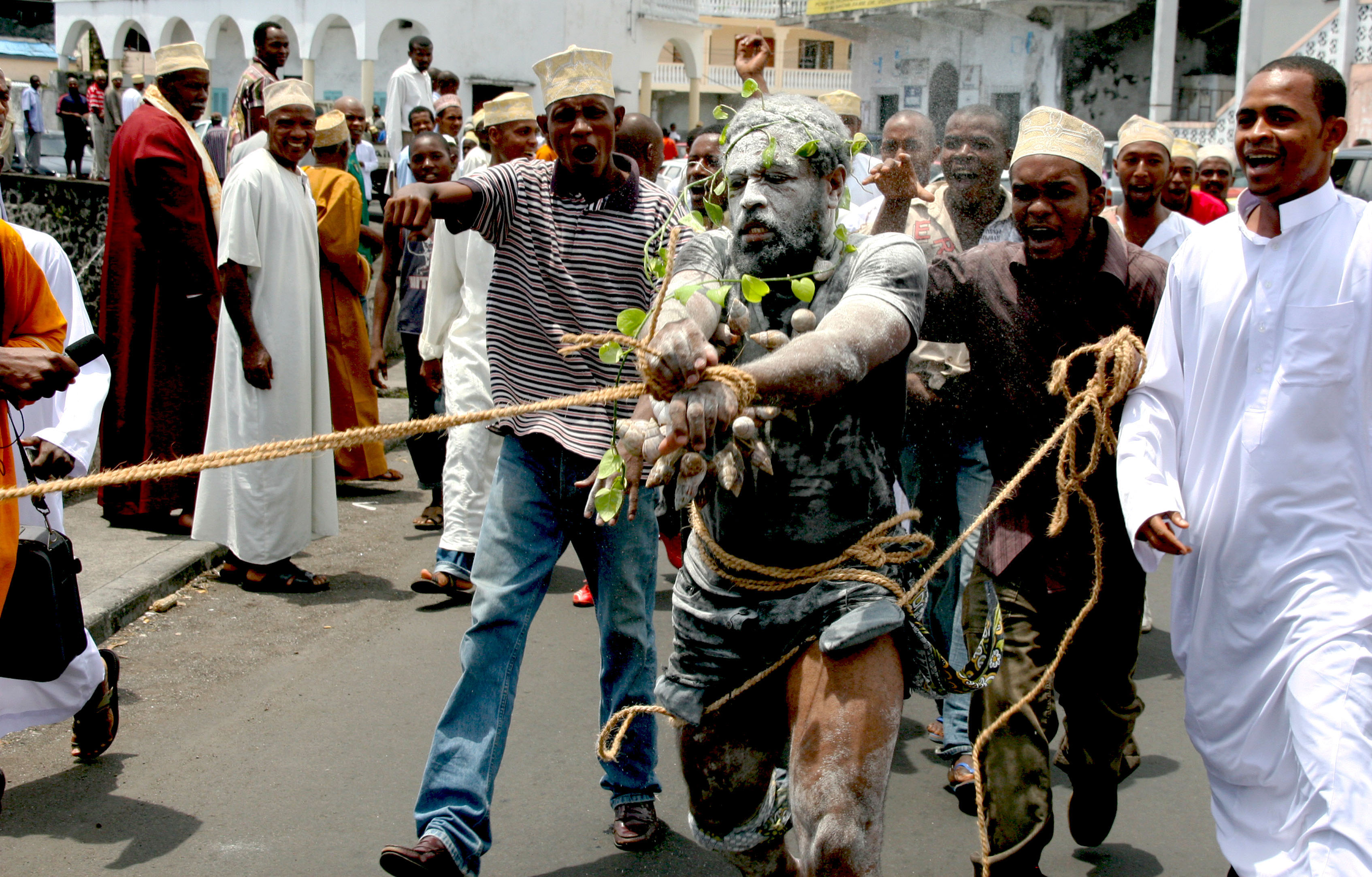 le comédien Soeuf Elbadawi, grimmé, ligoté et traîné,lors d'une performance réalisée avec Mawatwaniya dans les rues de la capitale comorienne le 13 mars 2009 contre l'occupation de l'île comorienne de Mayotte par la France, occupation jugée illégale par la communauté internationale.